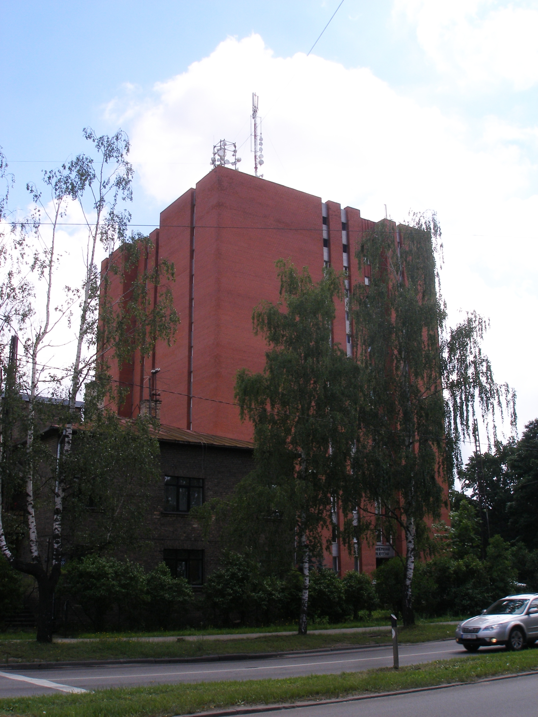 Akadēmiskās bibliotēkas ēka Lielvārdes ielā 24